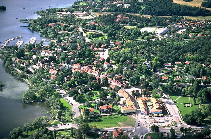 Motiv: Sigtuna stad Nyckelord: Flygbilder, Riksintressen Kategori: StadsmiljöSigtuna stad